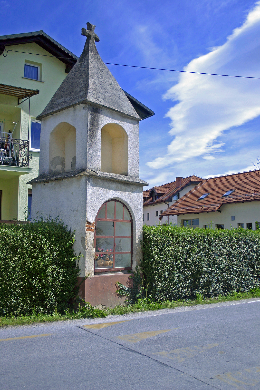 Nadstropno zidano slopno znamenje, Tišina.